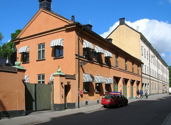 Tjärhovsgatan 9-11, Katarina Fire department, Stockholm, Sweden